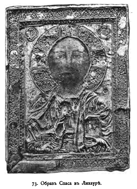 ქართული სიზველეები